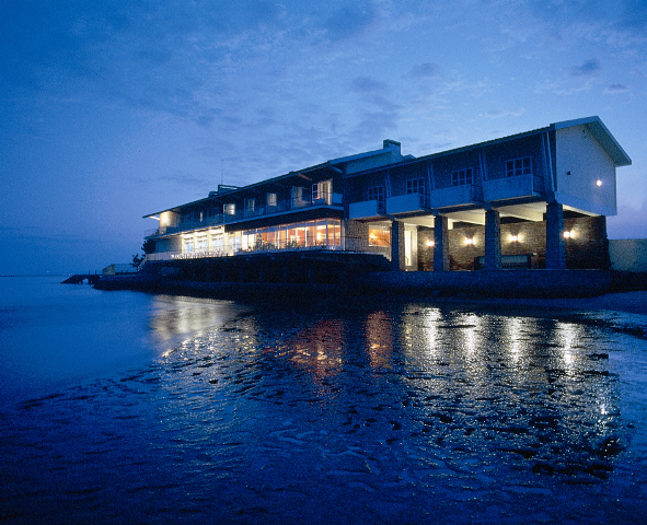 Pousada da Ria, na Murtosa, Aveiro, Portugal